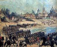 Invaciones inglesas sobre las costas de quilmes